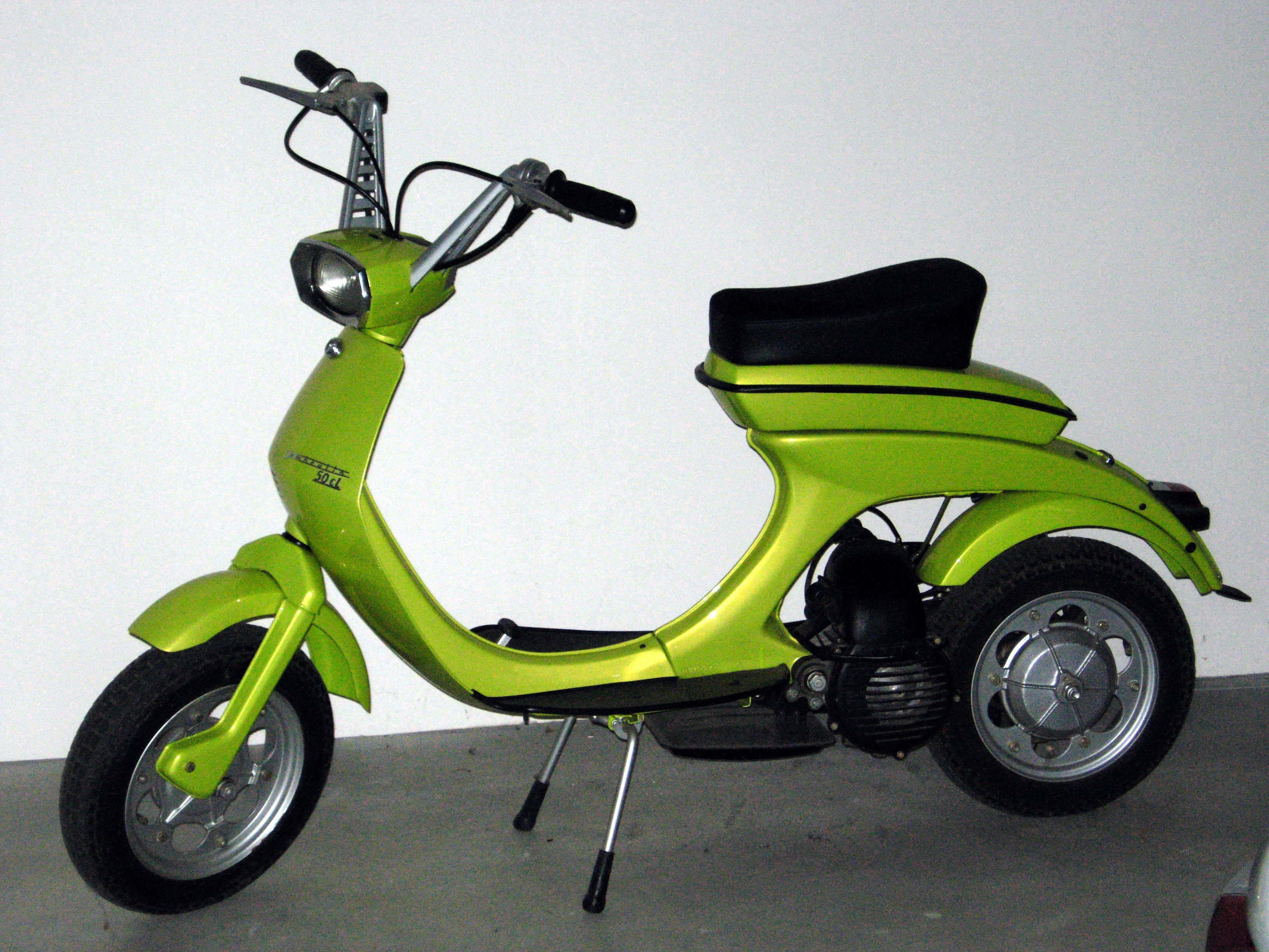 Lambretta Luna Range prototipe at Bertone style center